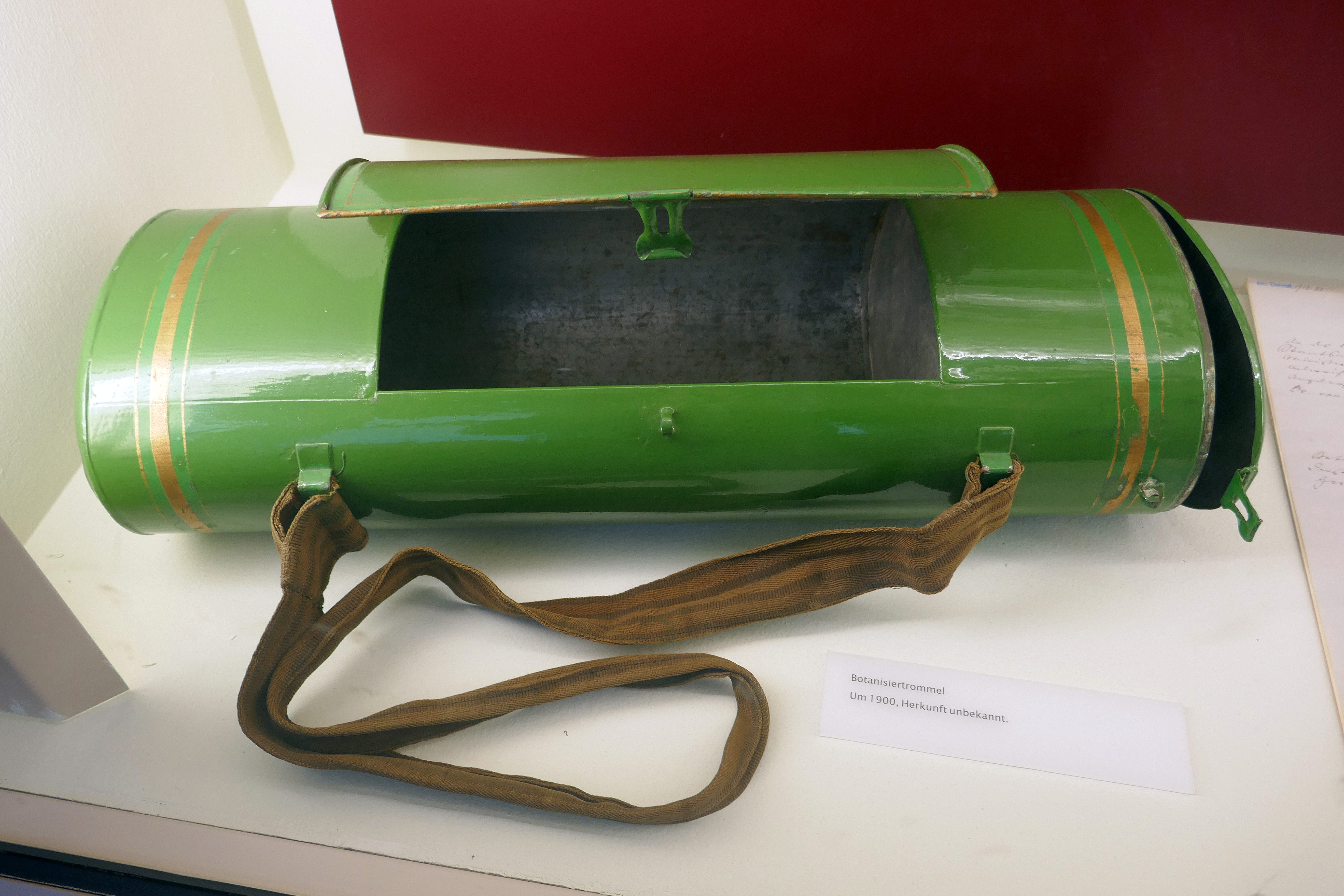 Boîte d'herborisation, d'origine inconnue (vers 1900). Musée botanique de Berlin.